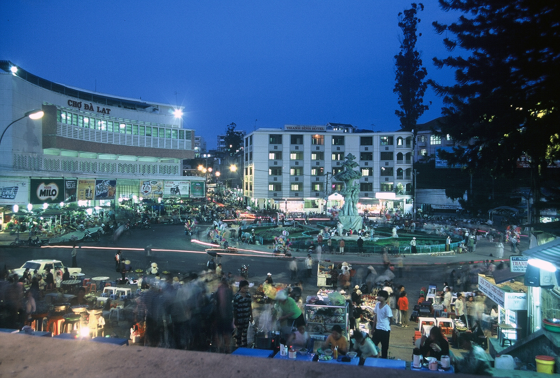 Dalat market, Vietnam.